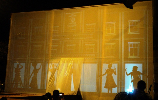 Introducción hacia la pasarela de Vistámonos de Iquitos.